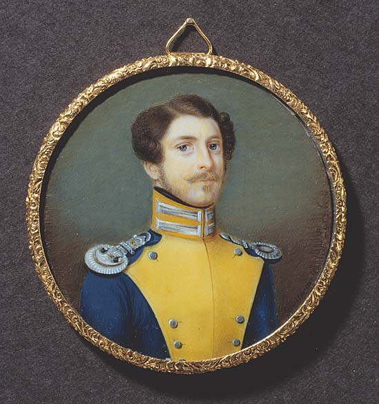 Fritz von Dardel (1817-1901). Miniature painting